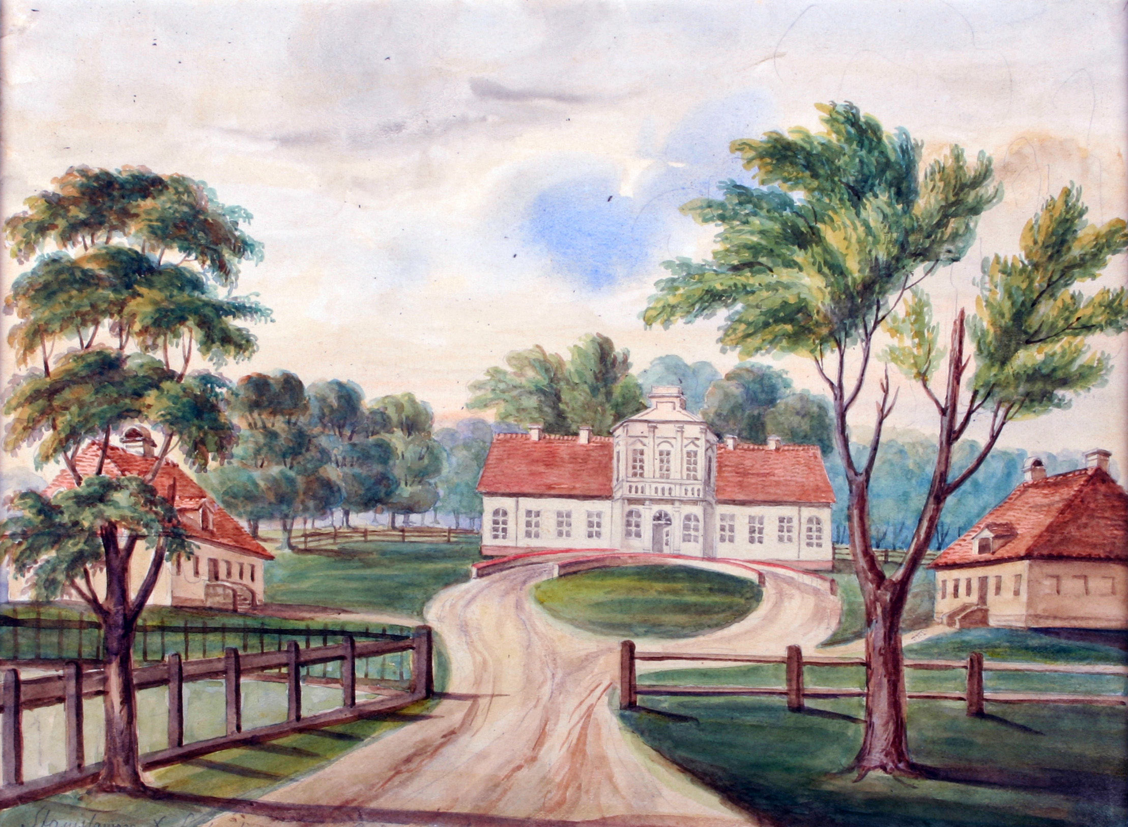 Гродна, Станіславова Беларуская (тарашкевіца): Горадня (Horadnia), Станіславова (Stanisłavova). Сядзіба